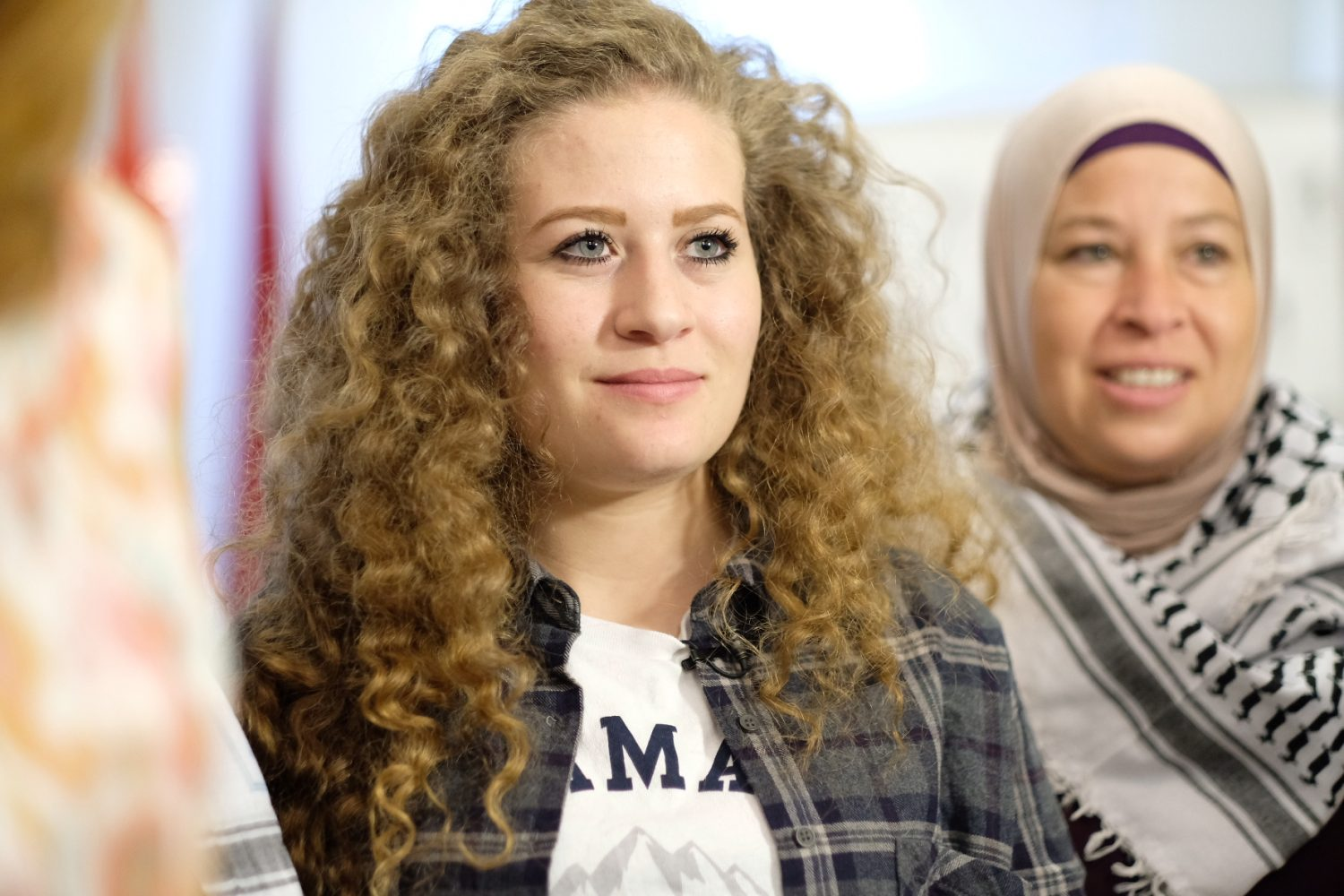 El tercer teniente de alcalde Mauricio Valiente, se ha reunido esta mañana con la activista palestina Ahed Tamimi, en un encuentro en el que ha querido mostrar el compromiso y la solidaridad del Ayuntamiento de Madrid con el pueblo palestino y con los Derechos Humanos y el Derecho Internacional. Valiente ha presentado a Tamimi como “ejemplo de lucha en defensa de los Derechos Humanos en general y de la causa palestina en concreto, representada hoy en ella”.